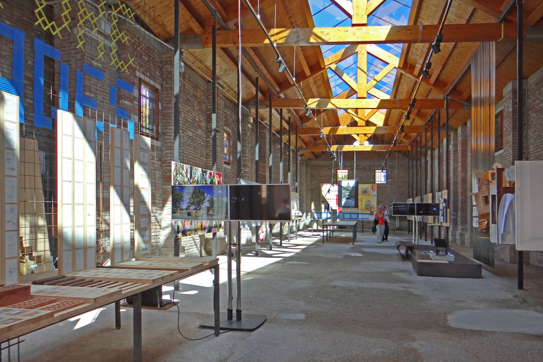 Grafting Architecture. Catalonia at Venice Pavillon de la Catalogne évènement collatéral de la biennale d'architecture 2014 La Catalogne loue depuis quelques années un ancien hangar des chantiers navals de Venise (castello 40 / Fondamenta quitavalle) pour présenter son propre pavillon. Le point de départ de cette exposition qui entend affirmer l'existence d'une architecture de tradition catalane est la Casa Bofarull (1913-1933) un des chantiers majeurs de l'architecte Josep Maria Jujol i Gilbert (1879-1949) où il a préservé le style régionaliste catalan dans l'esprit du modernisme de l'époque. Site de l'institut Ramon Llull, organisateur du pavillon de la Catalogne